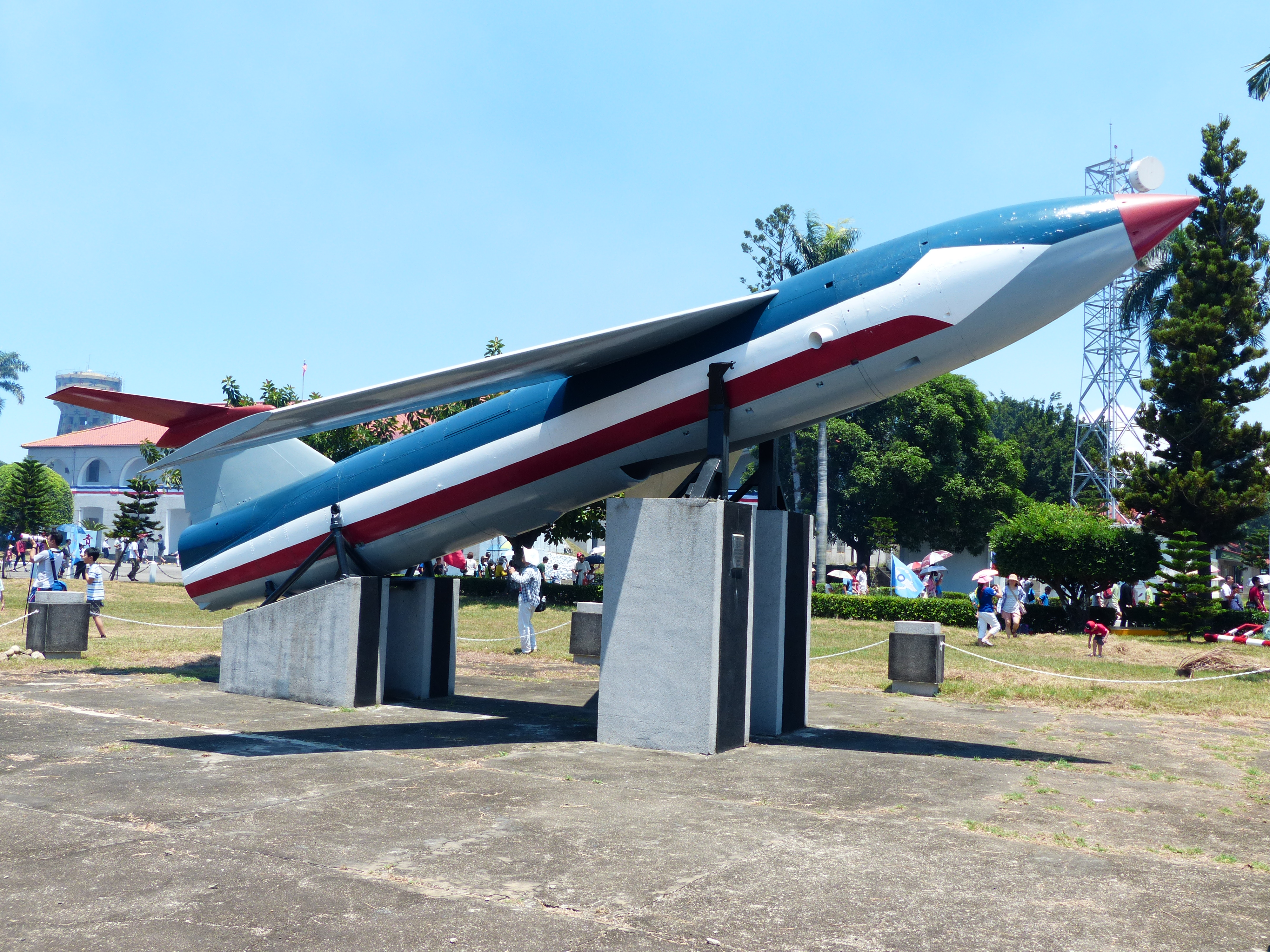 空軍臺南基地飛機展示區的MGM-1C屠牛士地對地巡航飛彈右側。